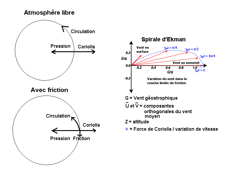 Effet de la friction sur la circulation des vents dans la couche limite atmosphérique. La friction ralentit le vent permettant au gradient de pression de devenir plus grand que la force de Coriolis et de dévier la circulation vers la plus basse pression. Cet effet est connu comme la spirale d'Ekman.